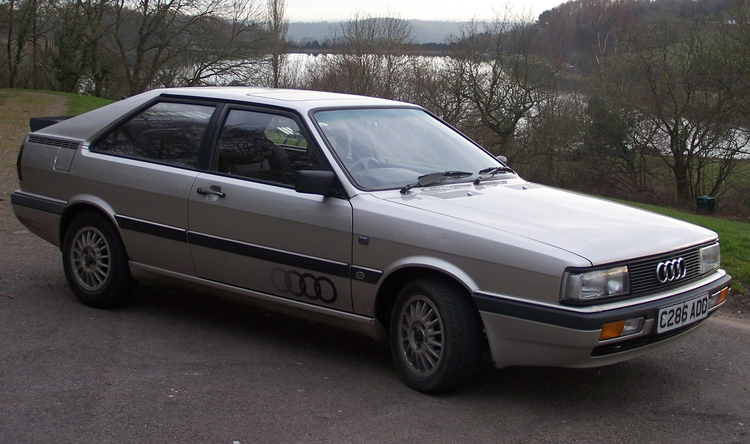 1986 Audi Coupe GT5E